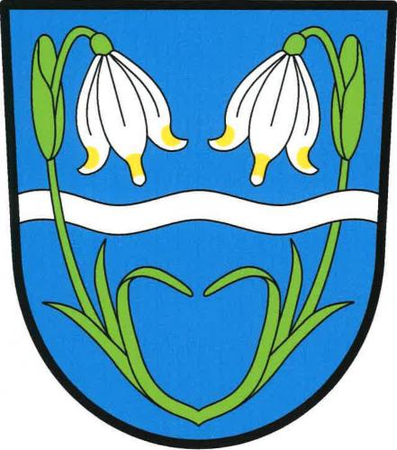 Třebichovice znak